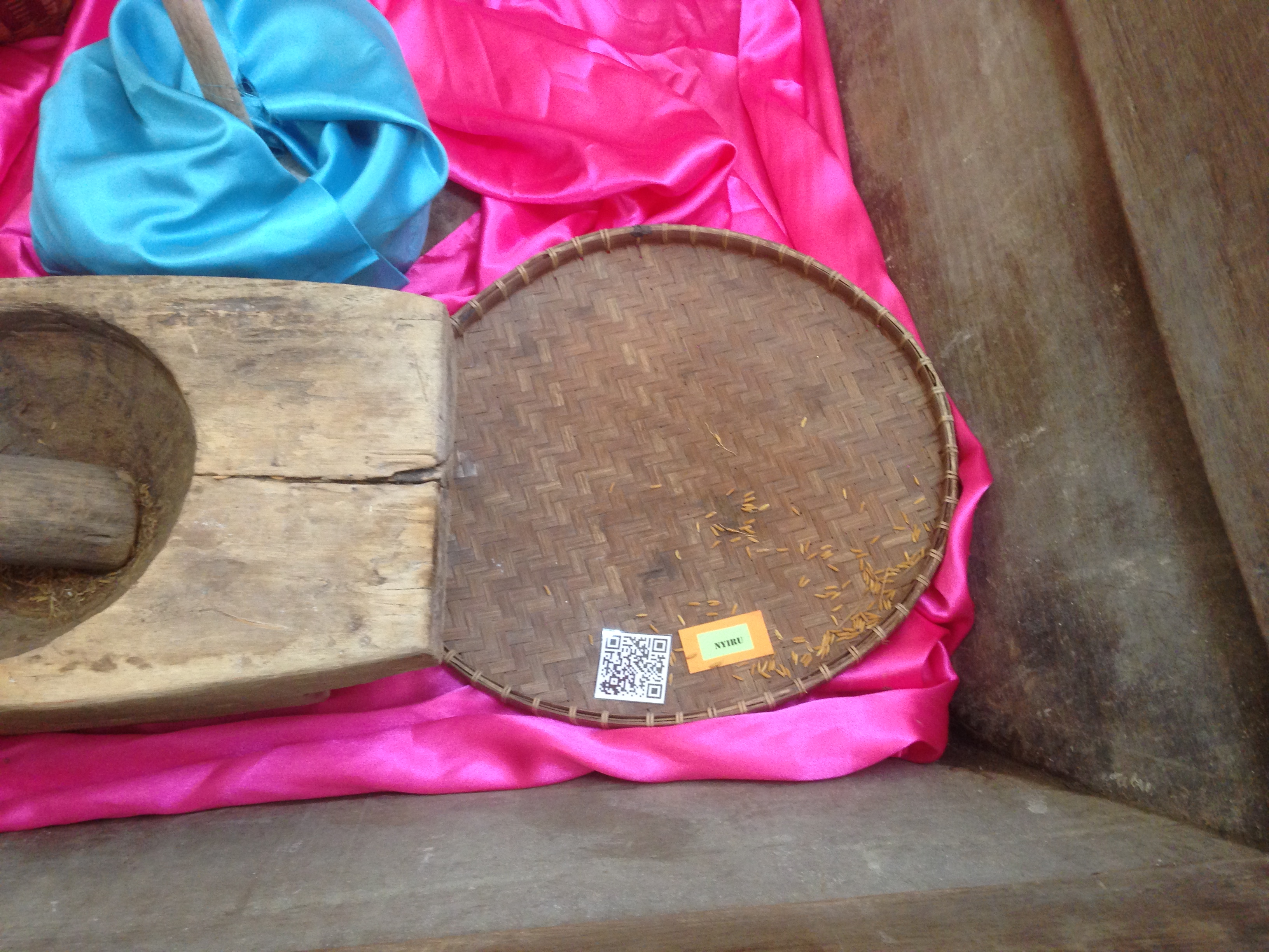 NYIRU